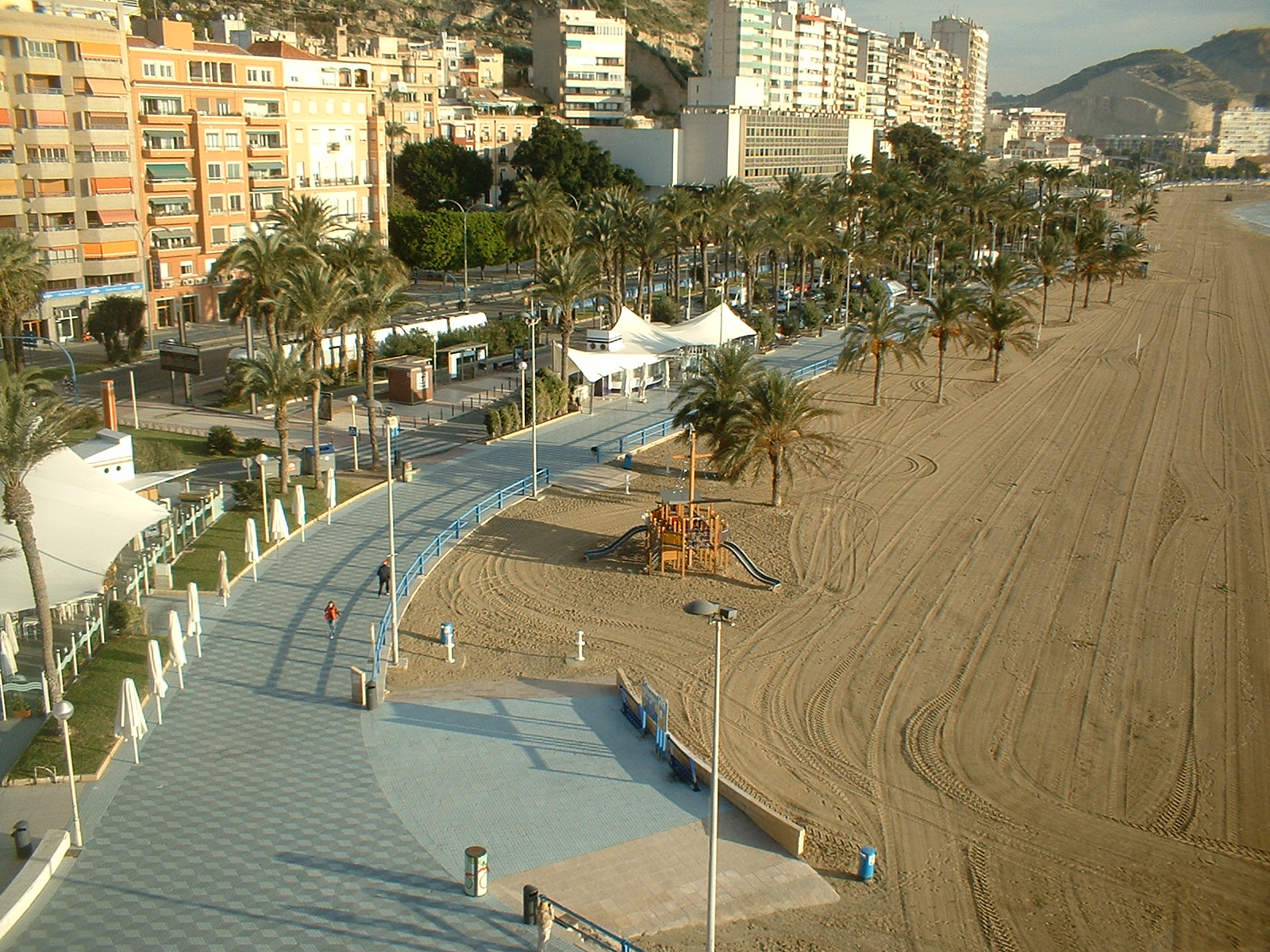 Playa del Postiguet, en Alicante, España